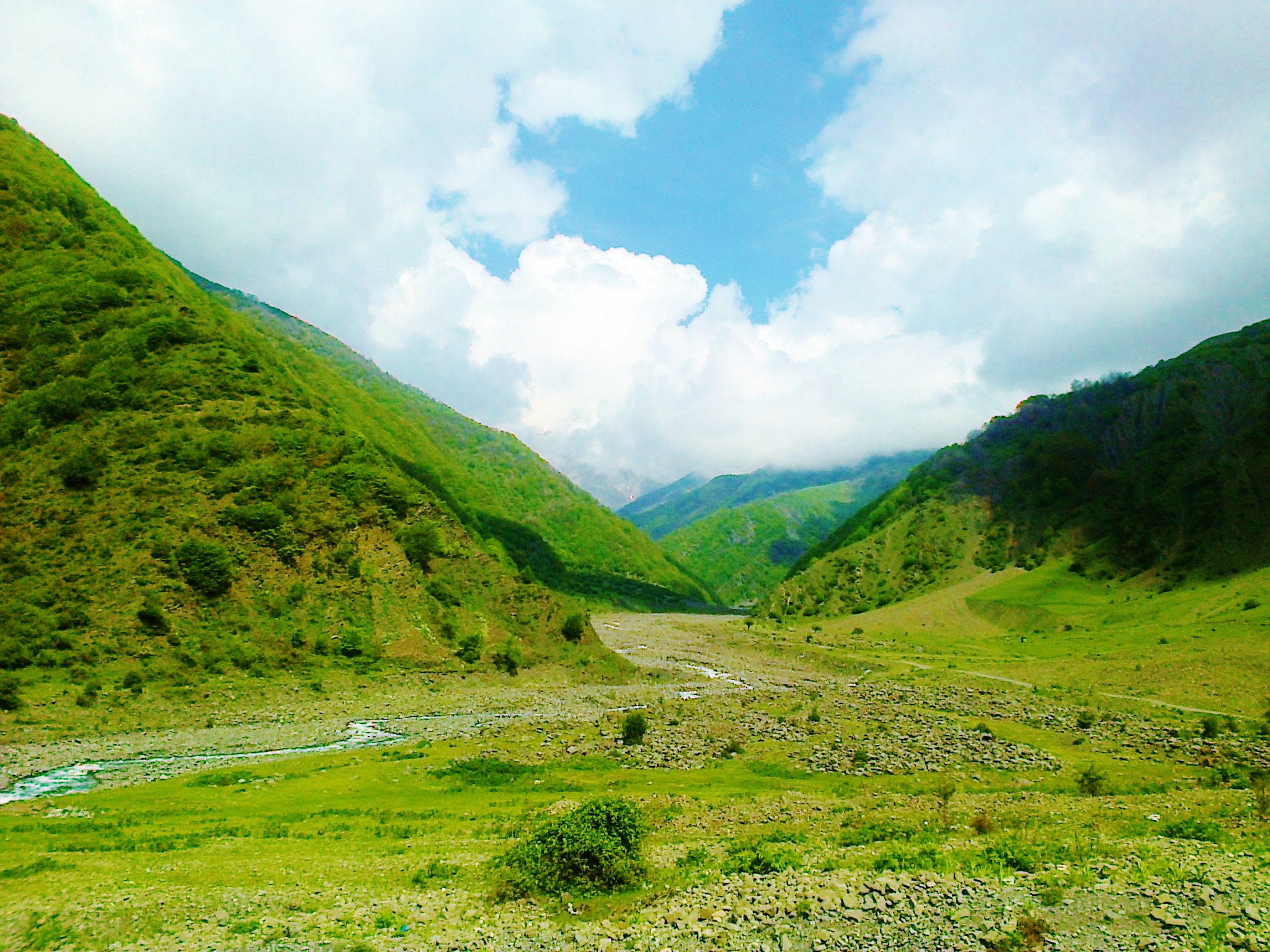 Hamamçay dərəsi.